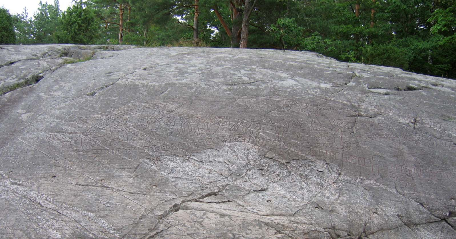 Runestone Sö 101, Ramsund